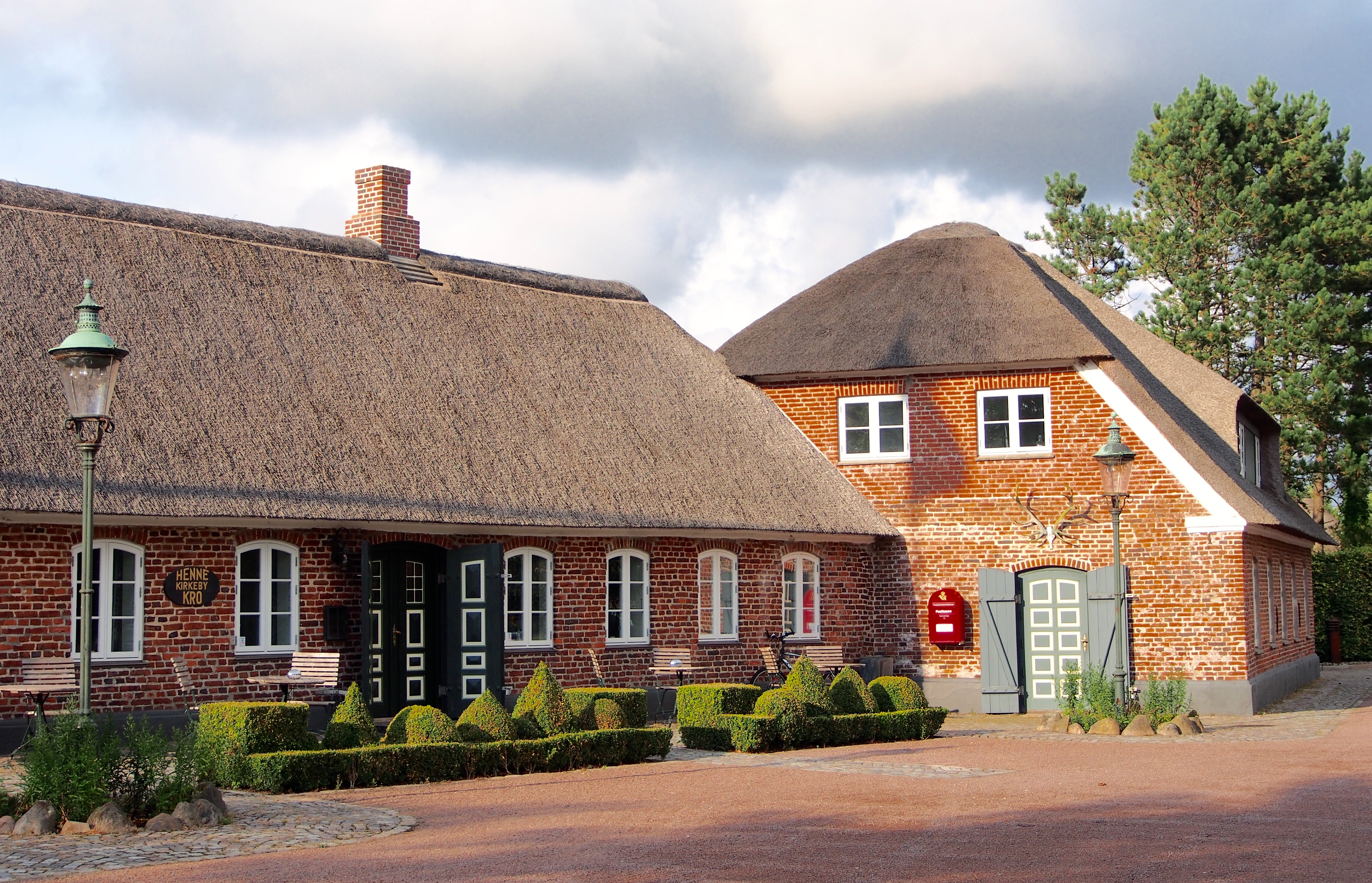 Henne Kirkeby Kro i 2014.